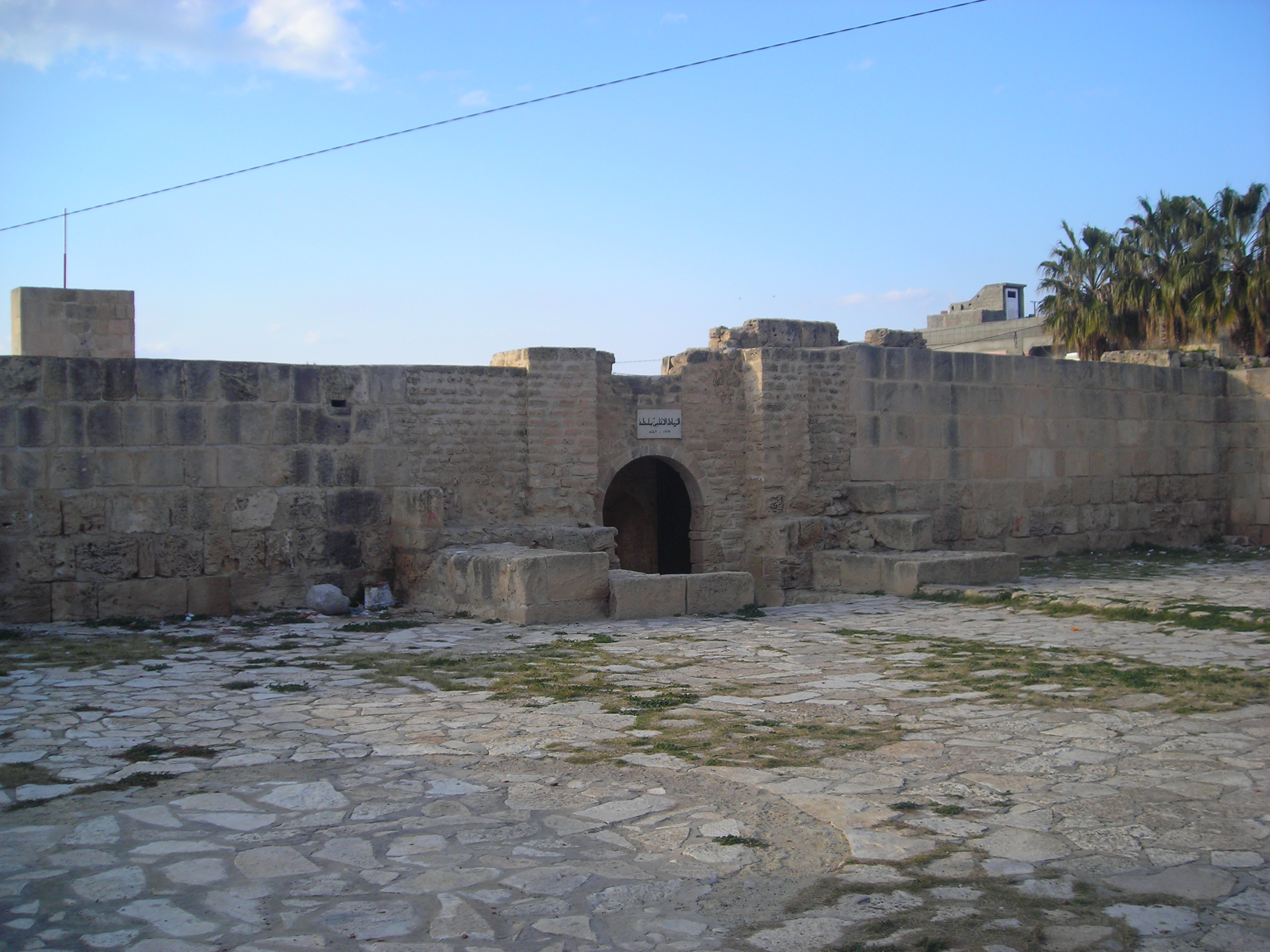 Ribat Aghlabite Lamta